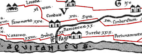 Détail de la table de Peutinger, copie von Scheyb ; segment II, Darioritum